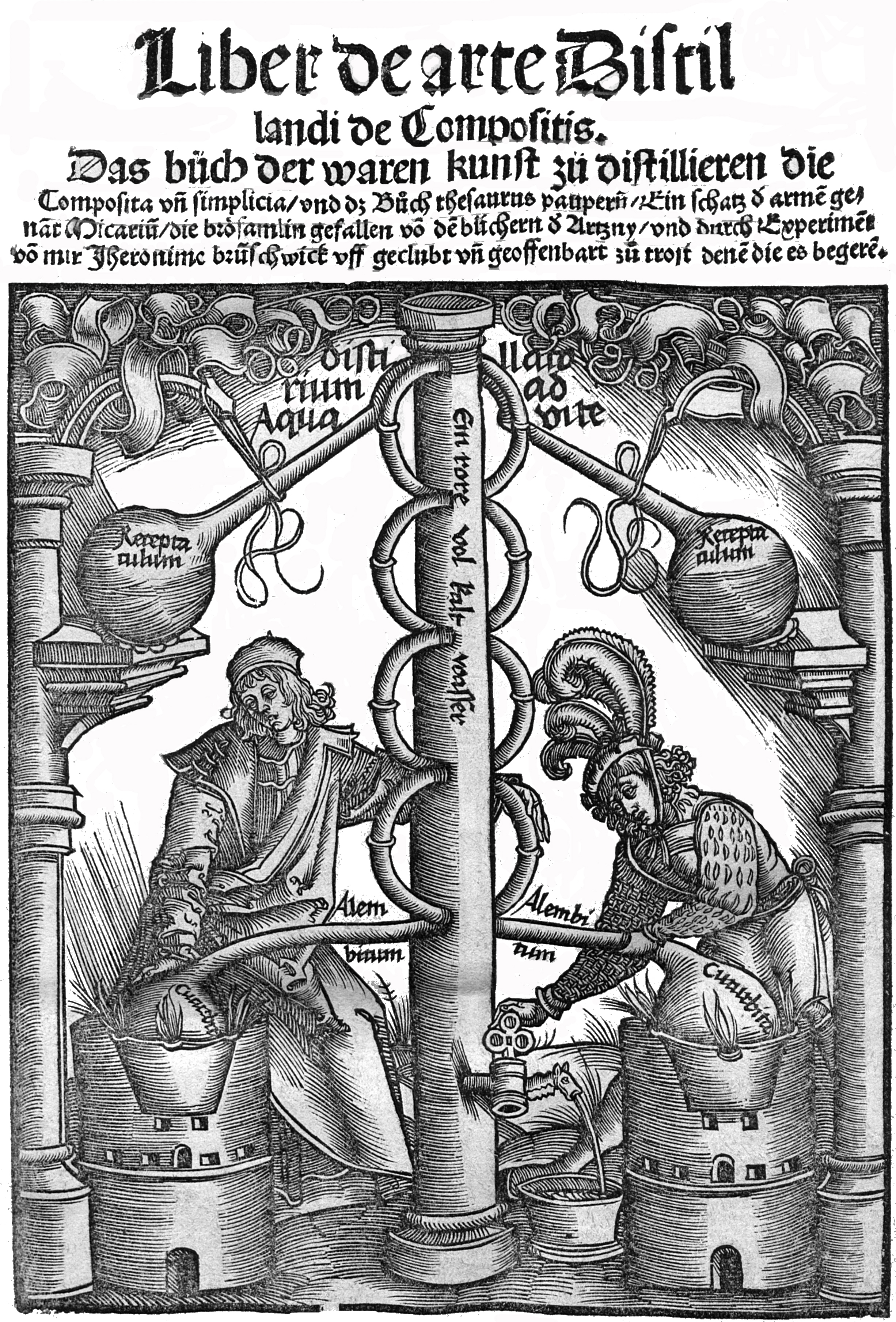 Aquavit-Brennerei